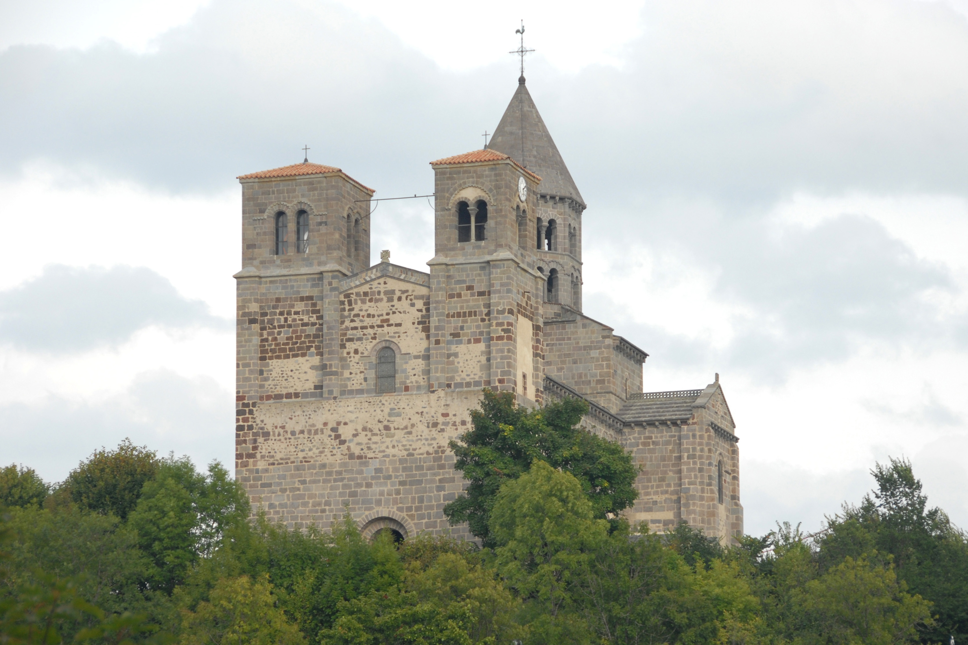 St.-Nectaire, Übersicht von SW